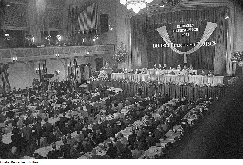 Original image description from the Deutsche FotothekBlick in die Kongresshalle mit den Teilnehmern des Deutschen Kulturgesprächs